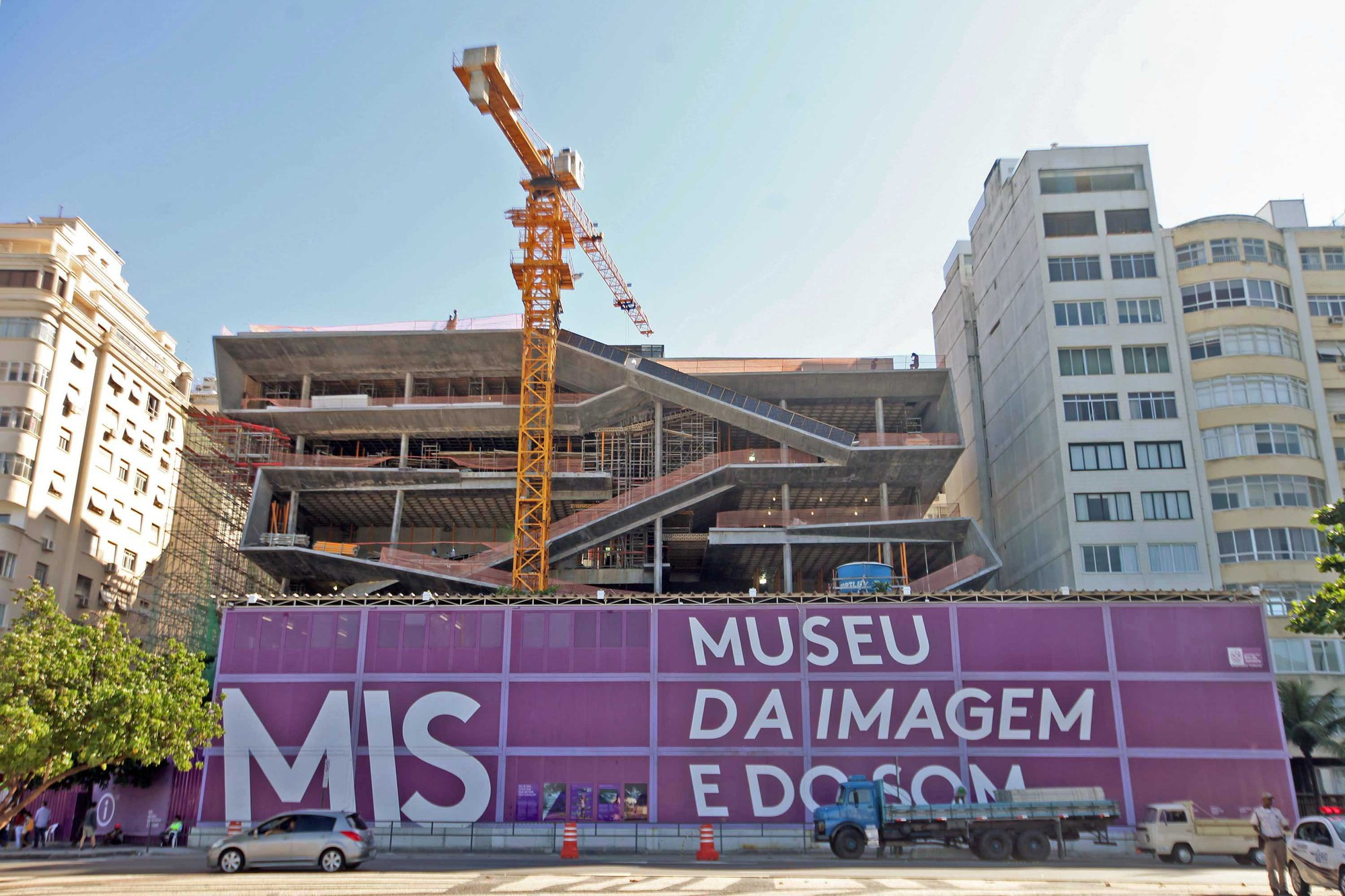 Obras do novo Museu da Imagem e do Som do Rio de Janeiro em junho de 2014. A construção do novo museu foi divida em três etapas: demolição da antiga Boate Help; fundações e estruturas; acabamentos, instalações e esquadrias. Com 9,8 mil metros quadrados de área, divididos em sete pavimentos, o museu abrigará salas de exposição de pequena e longa duração, salas para atividades didáticas, uma sala de teatro e cinema com 280 lugares, espaços destinados à pesquisa e o Museu Carmem Miranda.